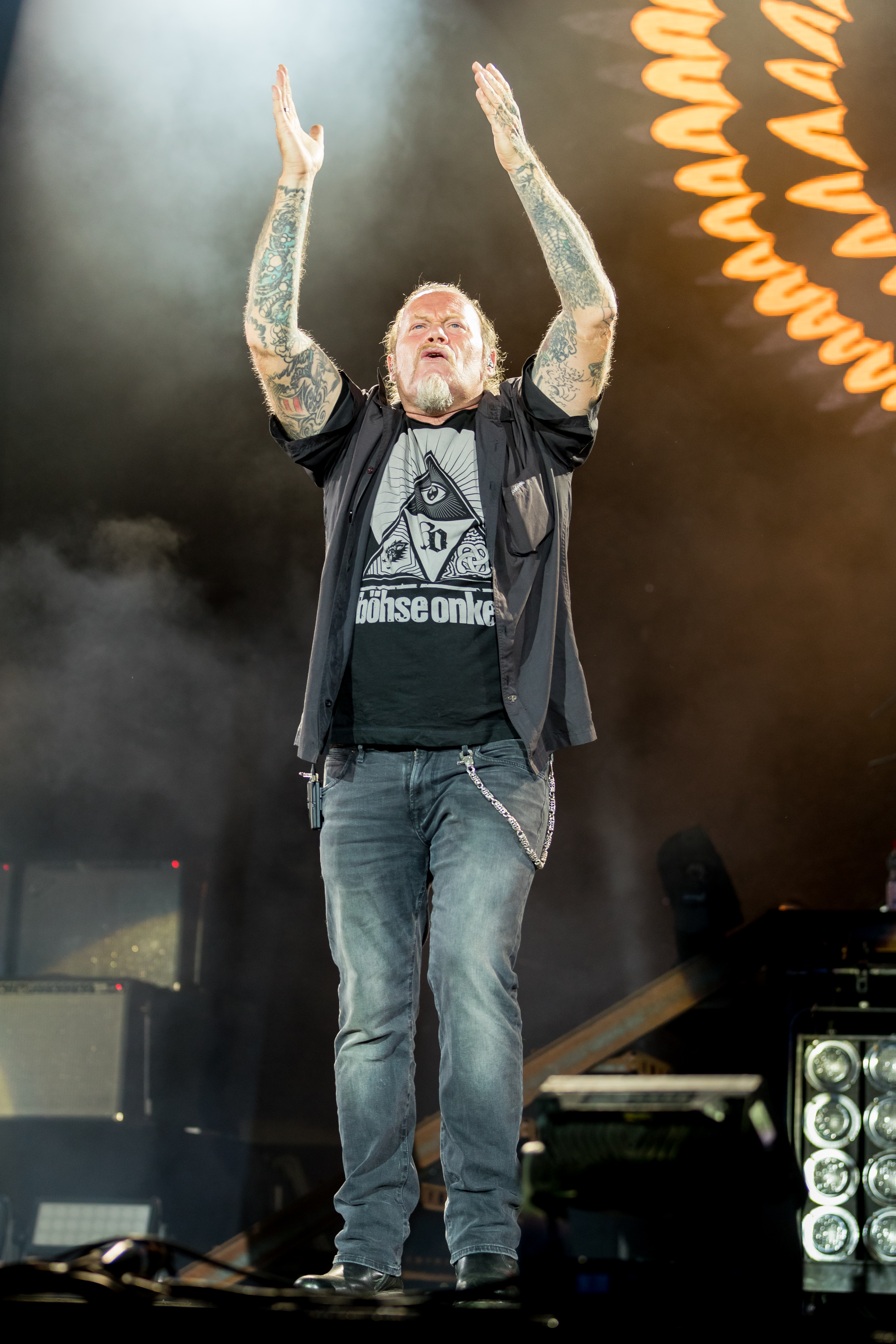 Böhse Onkelz during Werner Rennen at Flugplatz Hartenholm, Hasenmoor, Schleswig-Holstein, Germany on 2019-08-31, Photo: Sven Mandel